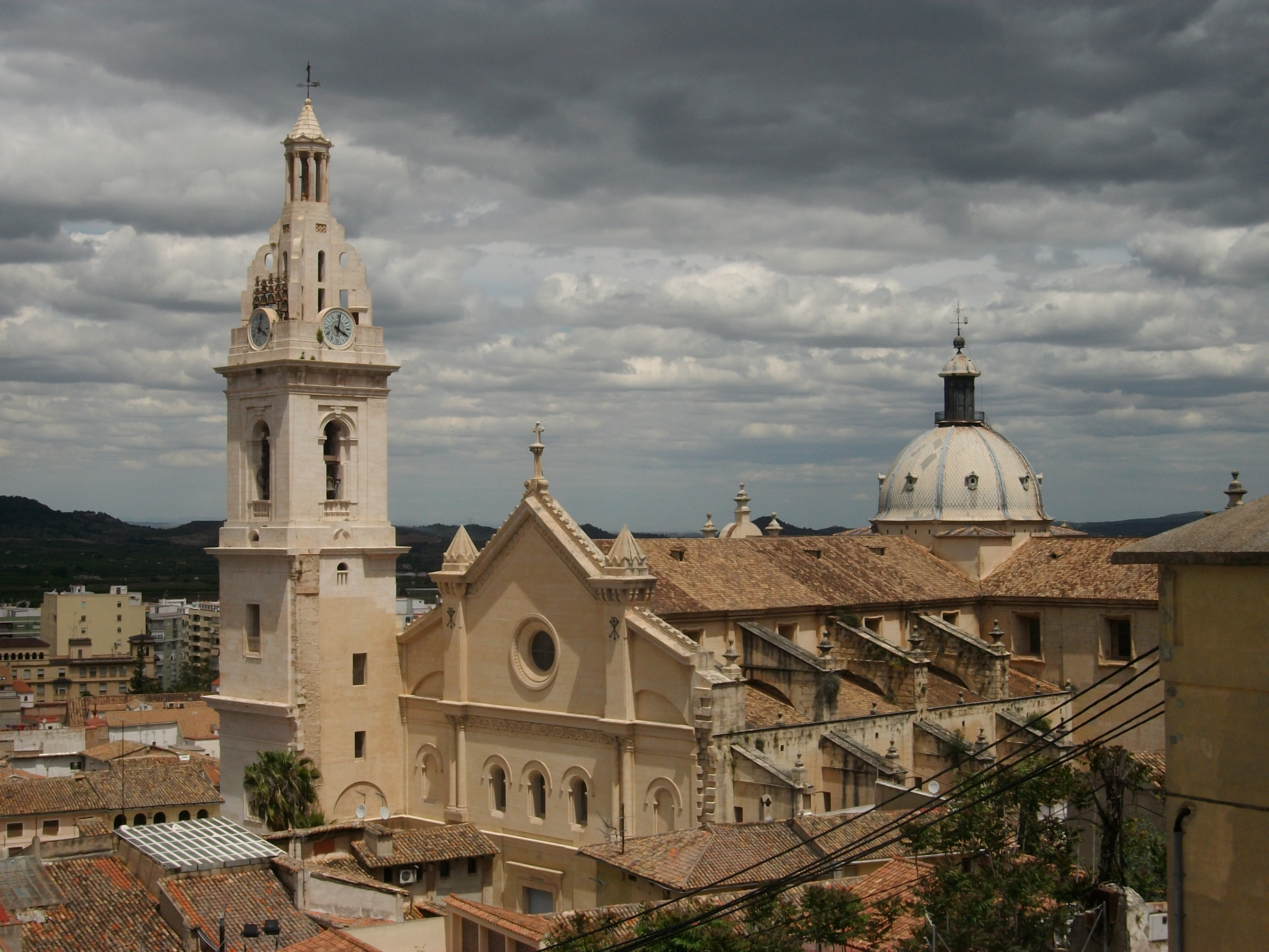 Vista de la Seu o Col·legiata de Xàtiva, la Costera.